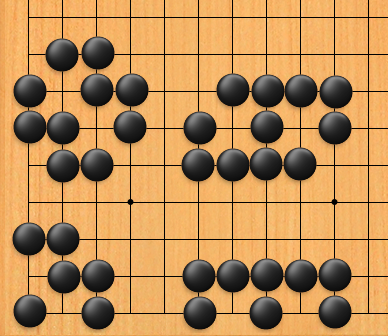 Ett par situationer inom brädspelet Go: Samtliga svarta grupper har två ögon och kan därför aldrig fångas.